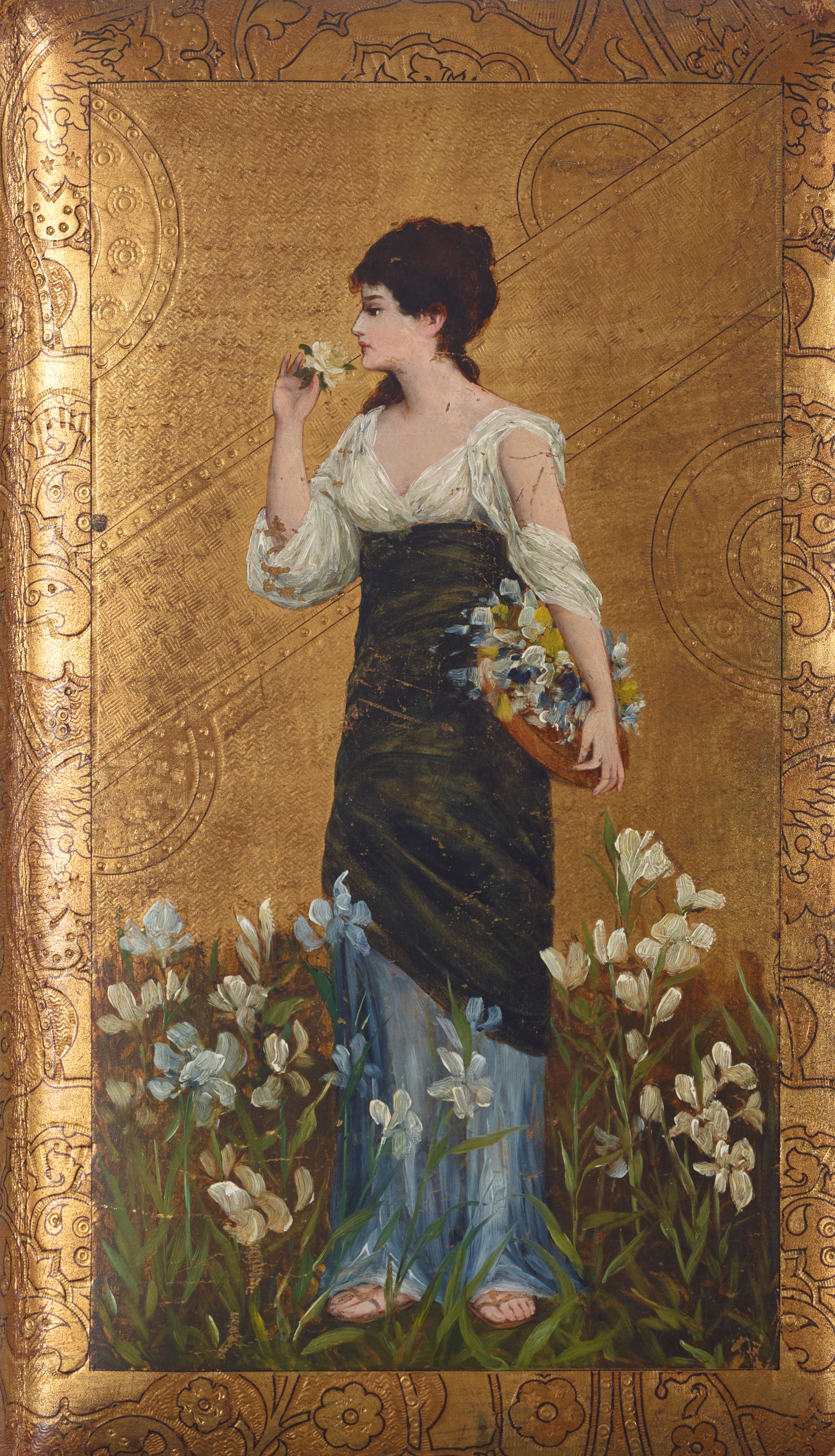 Heinrich Schmidt-Pecht: Bemalter Deckel eines Photoalbums (o.J.); Einband gepresstes und bemaltes Leder; 34,5 x 20 cm; Städtische Wessenberg-Galerie Konstanz